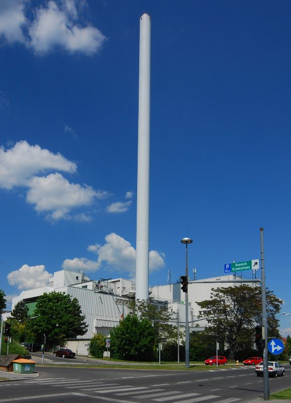 Müllverbrennungsanlage Flötzersteig in Wien-Ottakring, die älteste bestehende MVA von Österreich